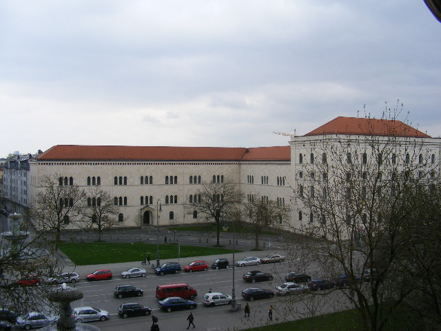 Munich